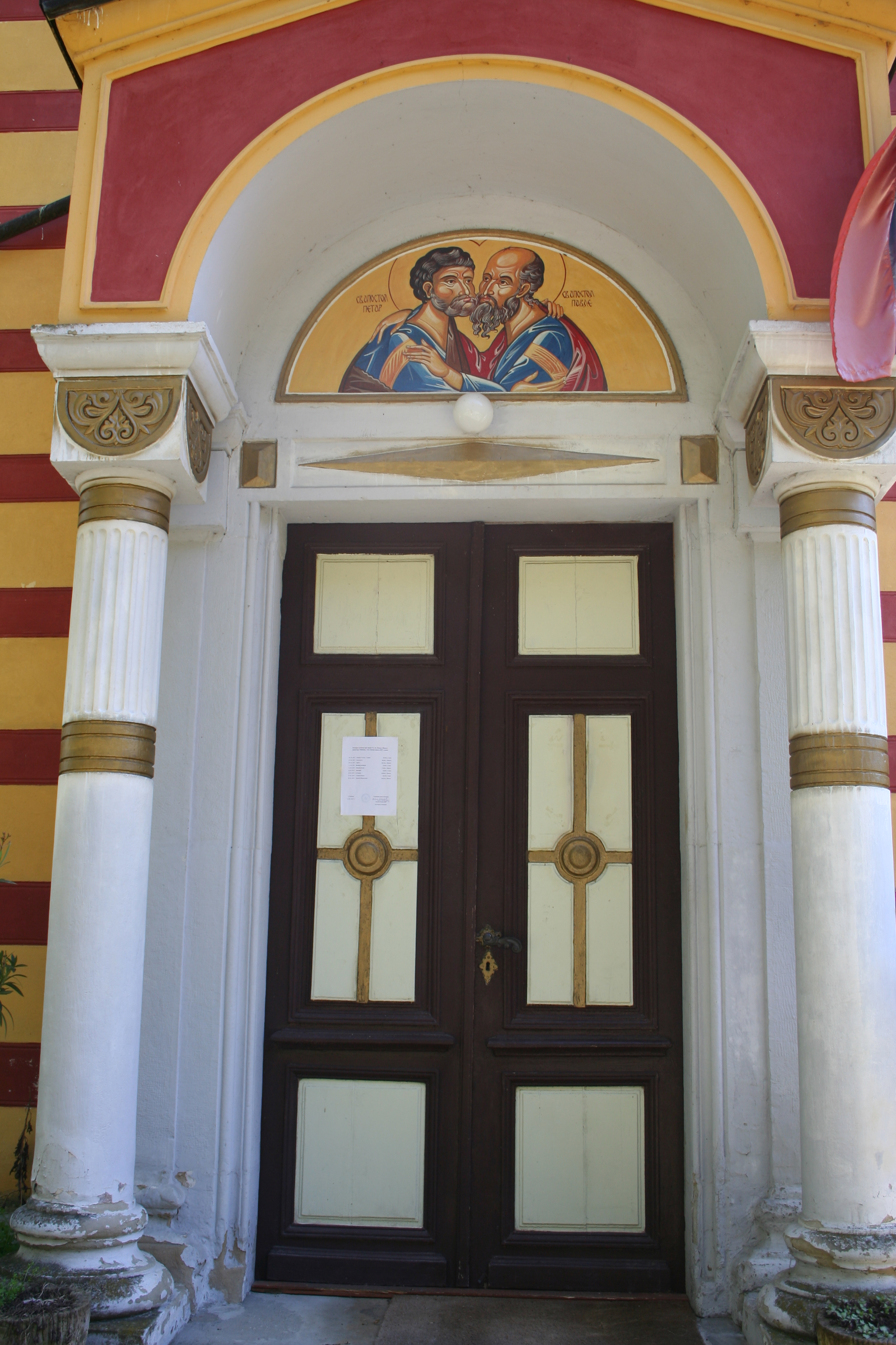 Manastir Ribnica, Paštrić